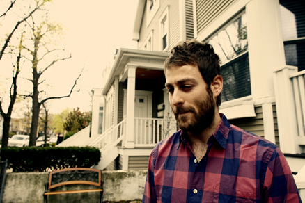 Mike Kinsella, músico proveniente de chicago. Esta relacionado con Cap'n Jazz, American Football y Owen.